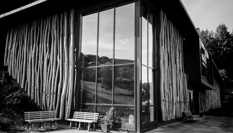 Musée du Protestantisme, de la Réforme à la laïcité, Ferrières, Tarn (81), France.